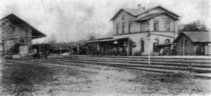 Bahnhof Lindern, Postkarte um 1900 (Geilenkirchen, Deutschland)